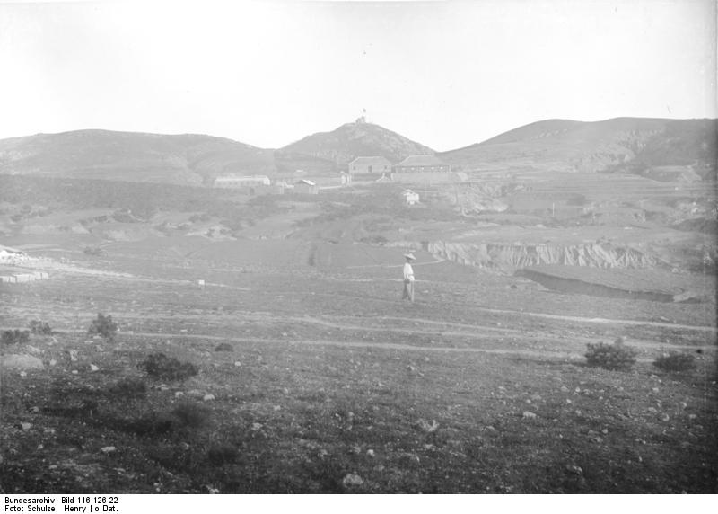 China, Tsingtau China, Tsingtau [Blick zum Berg mit Turm] [China, Tsingtau]